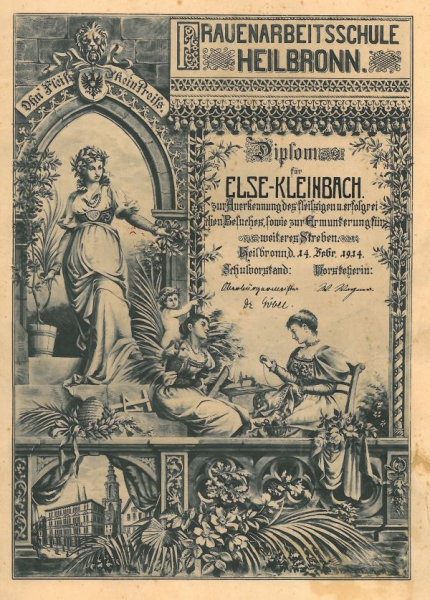 Schmuckdiplom der Frauenarbeitsschule in Heilbronn-Böckingen für den erfolgreichen Besuch, 1914, mit Unterschriften des Heilbronner Oberbürgermeisters Göbel und der Schulleiterin Wagner